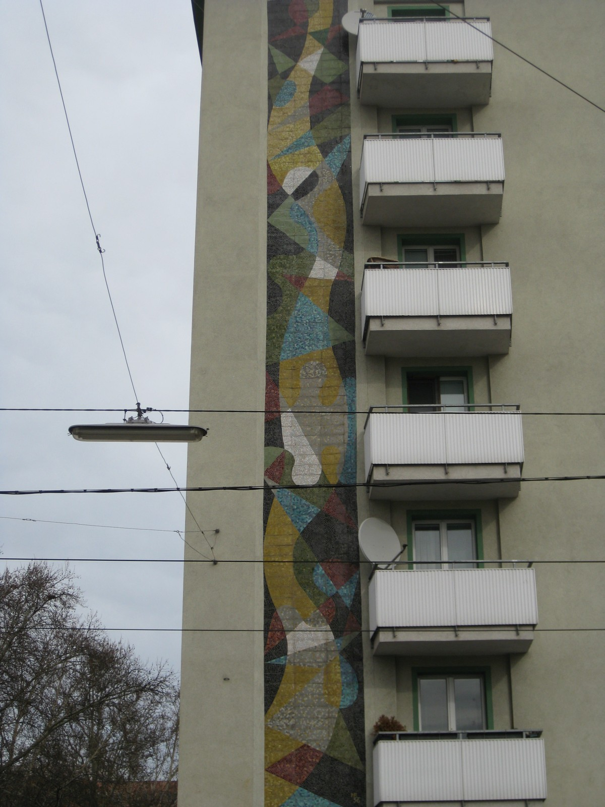 Mosaikfries Ornament von Harold Reitterer aus dem Jahre 1956 am Gemeindebau Max Wopenka-Hof in der Geiselbergstraße 27-31 in Wien Simmering.